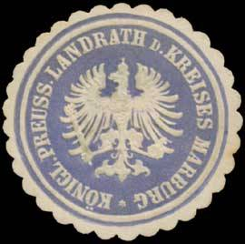 Sealing stamp Title: K.Pr. Landrath d. Kreises Marburg Description: blau, weiß, geprägt Place: Marburg size: 3 cm